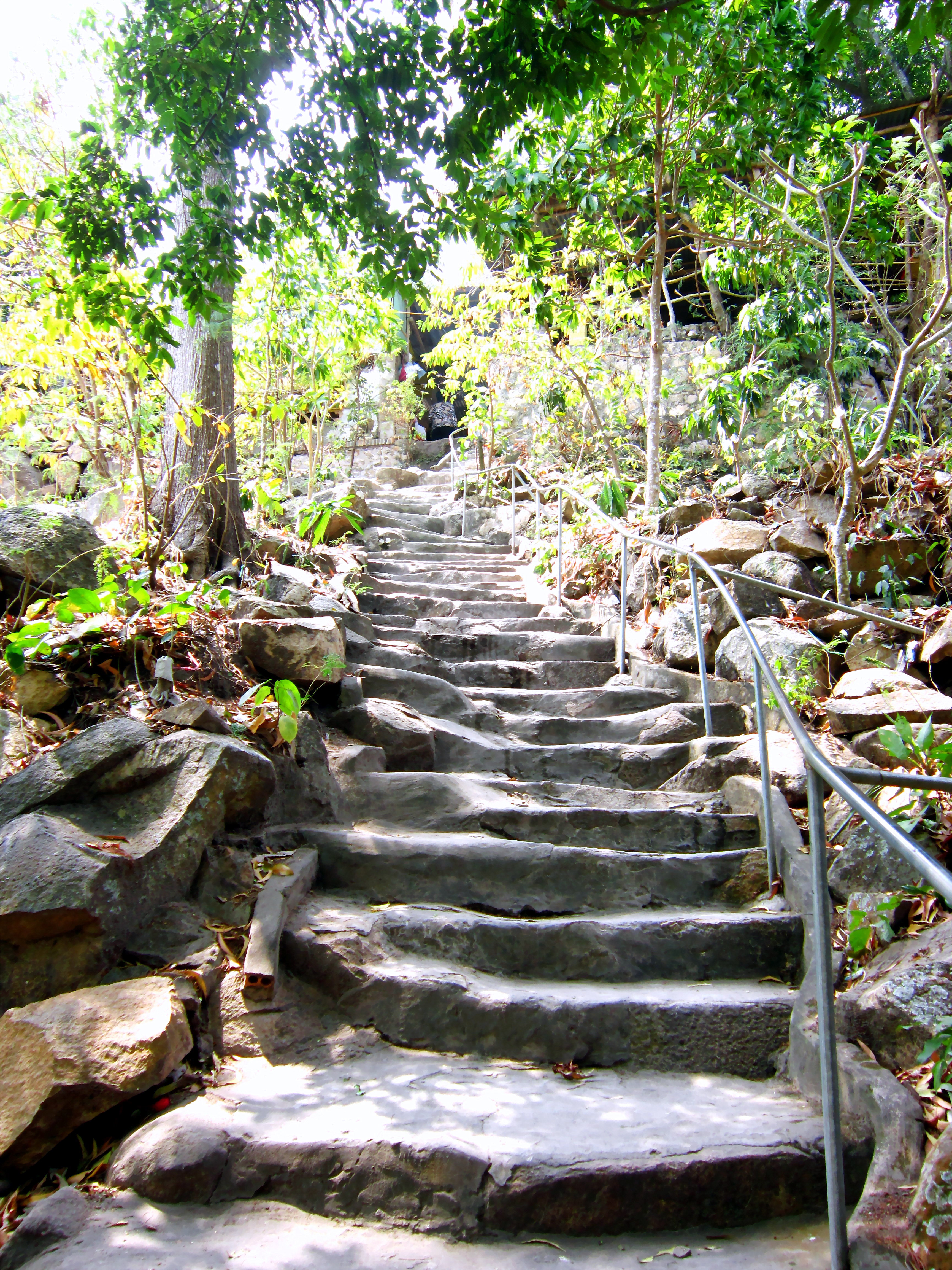 Đường lên đỉnh núi Trà Sư ở thị trấn Nhà Bàng, huyện Tịnh Biên, An Giang, Việt Nam.